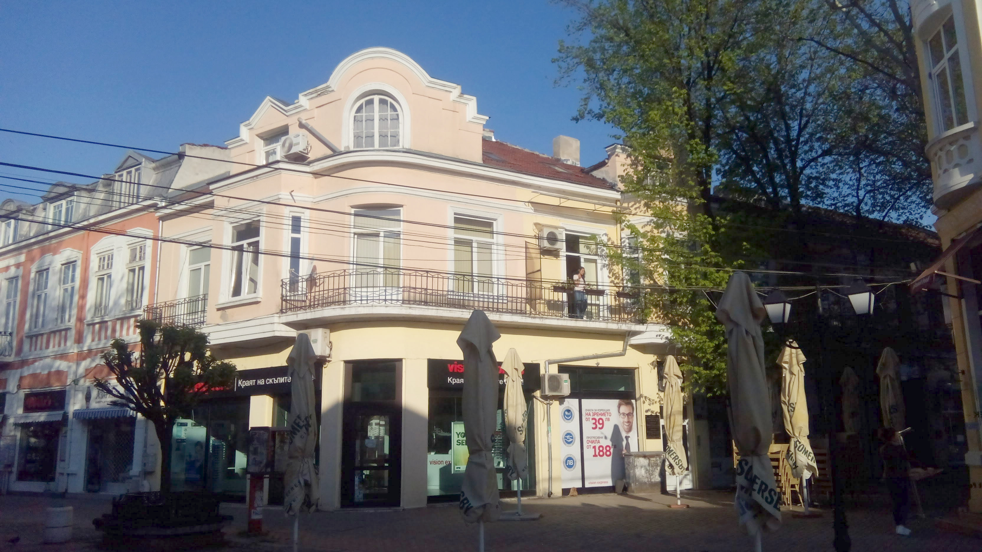 Къщата на Георги Стойнов